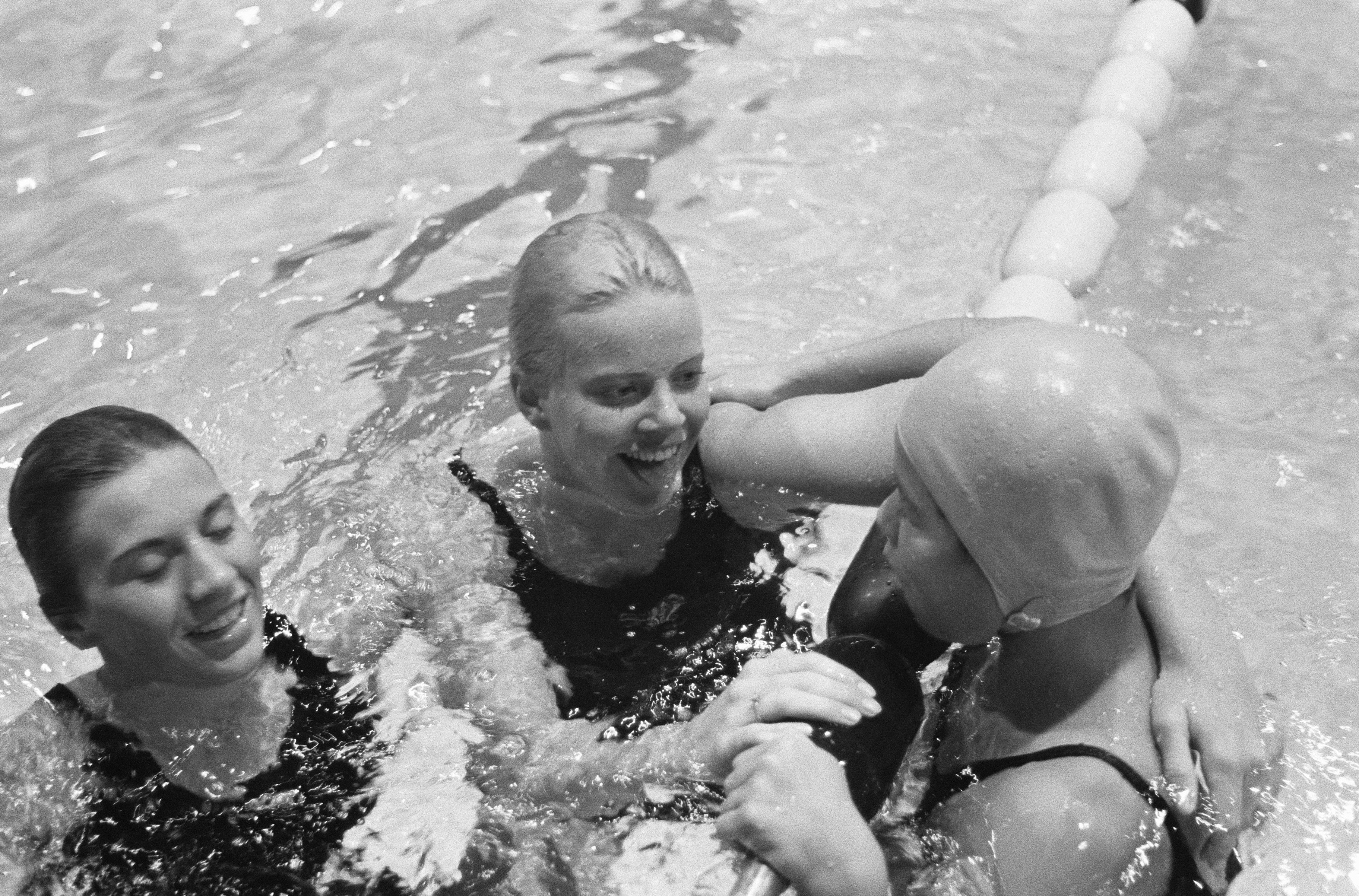 Collectie / Archief : Fotocollectie Anefo Reportage / Serie : [ onbekend ] Beschrijving : Olympische Spelen te Rome, v.l.n.r. Ria van Velzen , Burke en Tanaka Datum : 11 september 1960 Locatie : Italië, Rome Trefwoorden : sport, zwemmen Persoonsnaam : Burke, Tanaka, Velsen, Ria van Fotograaf : Pot, Harry / Anefo Auteursrechthebbende : Nationaal Archief Materiaalsoort : Negatief (zwart/wit) Nummer archiefinventaris : bekijk toegang 2.24.01.05 Bestanddeelnummer : 911-5836